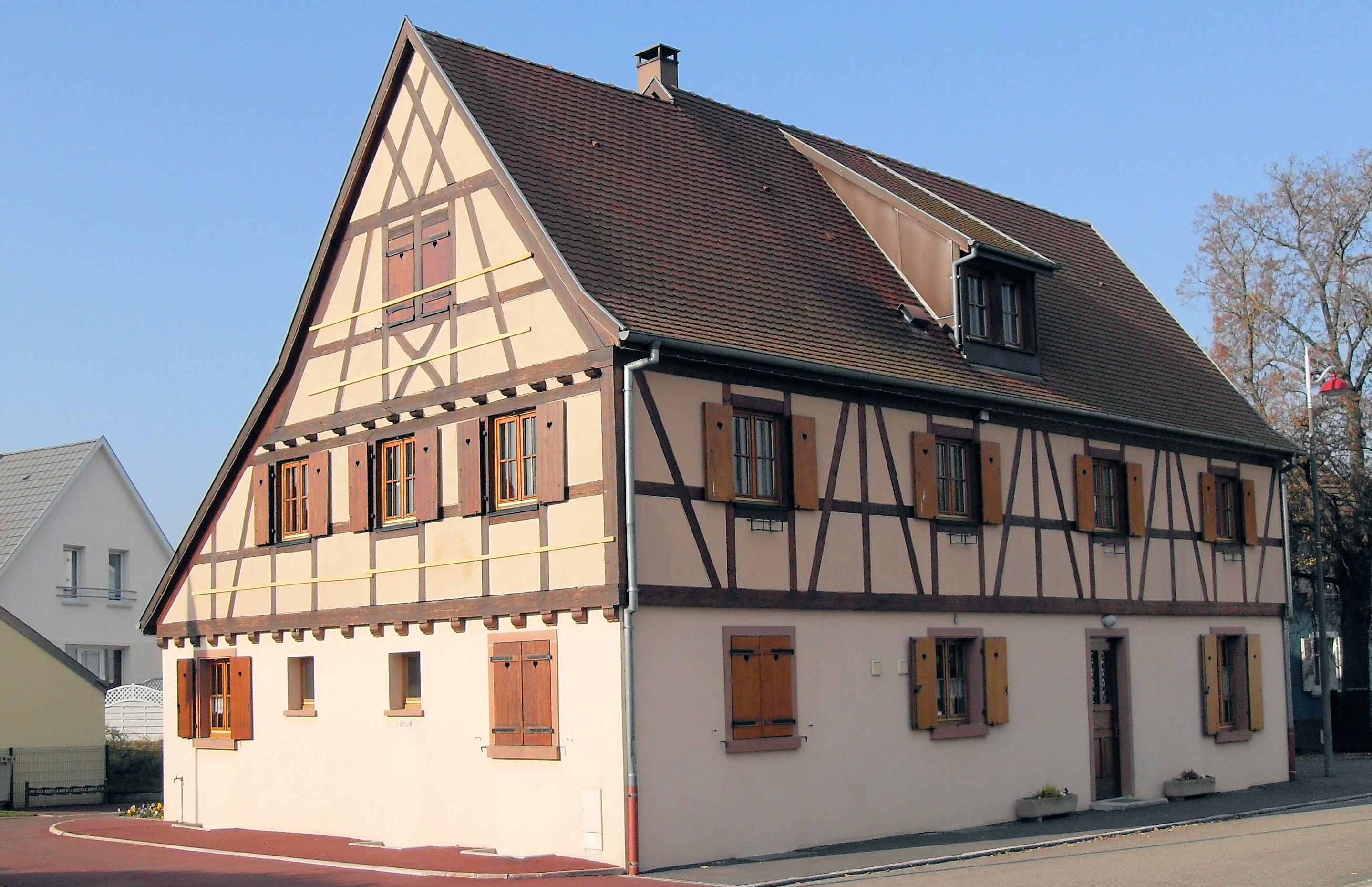 La mairie de Petit-Landau